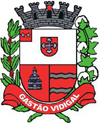 Brasão da cidade de Gastão Vidigal, SP